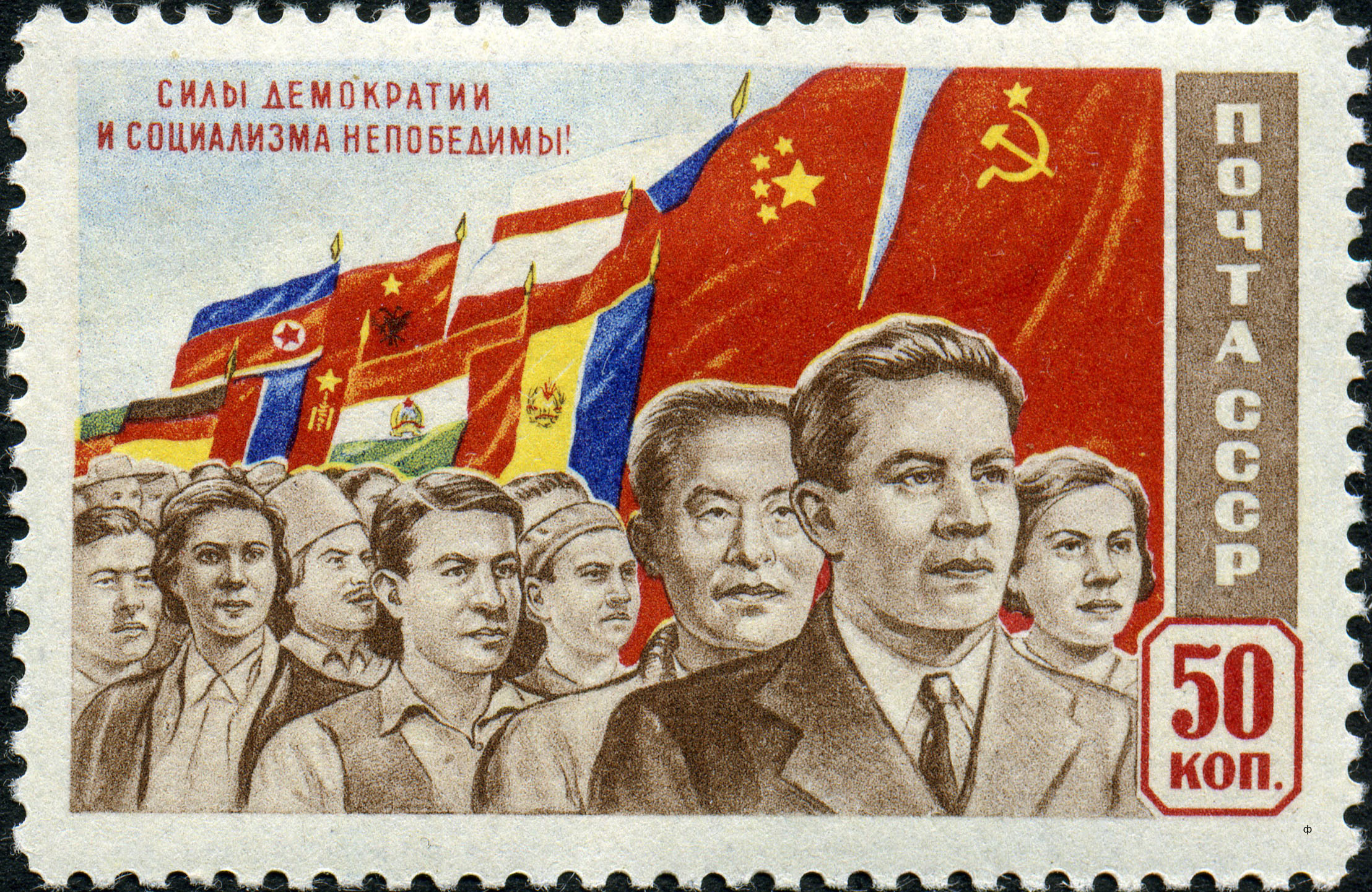 Марка СССР «Силы демократии и социализма непобедимы!», выпущенная в августе 1950 года. Художник — Р. Житкова. Номер по каталогу ЦФА — 1557. Тираж — 1 млн экз.